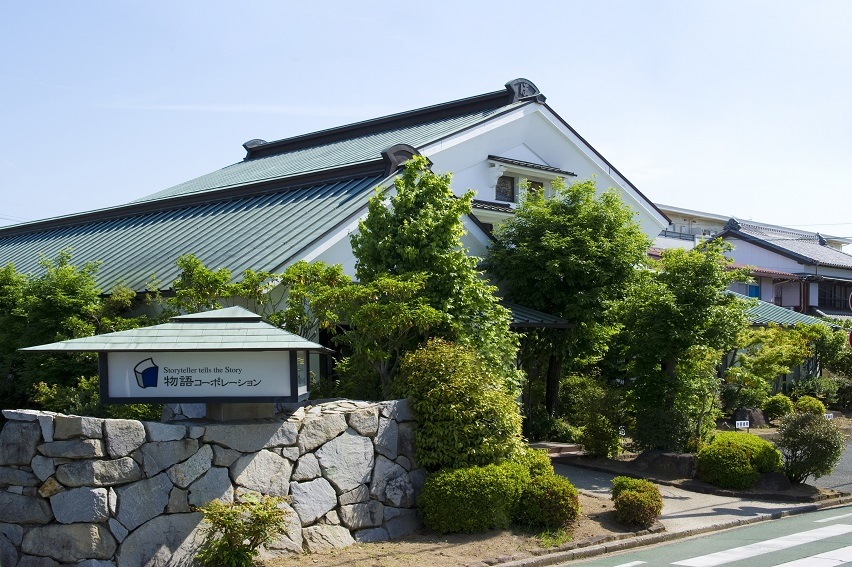 物語コーポレーション本社外観